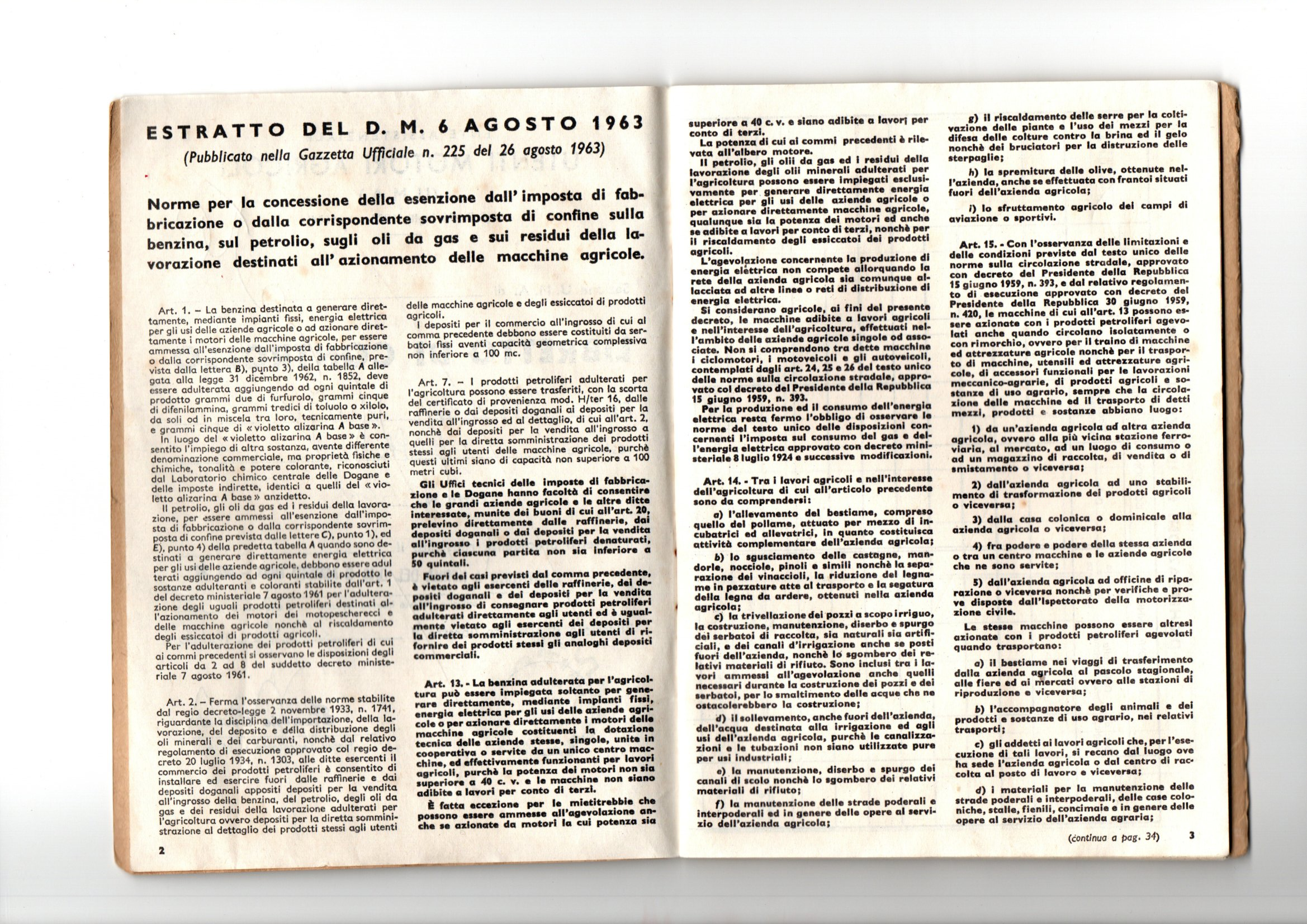 Regolamento uma 1